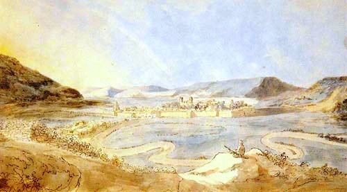 Festung Verdun, 1792, Aquarell (Besitz: Stiftung Weimarer Klassik)